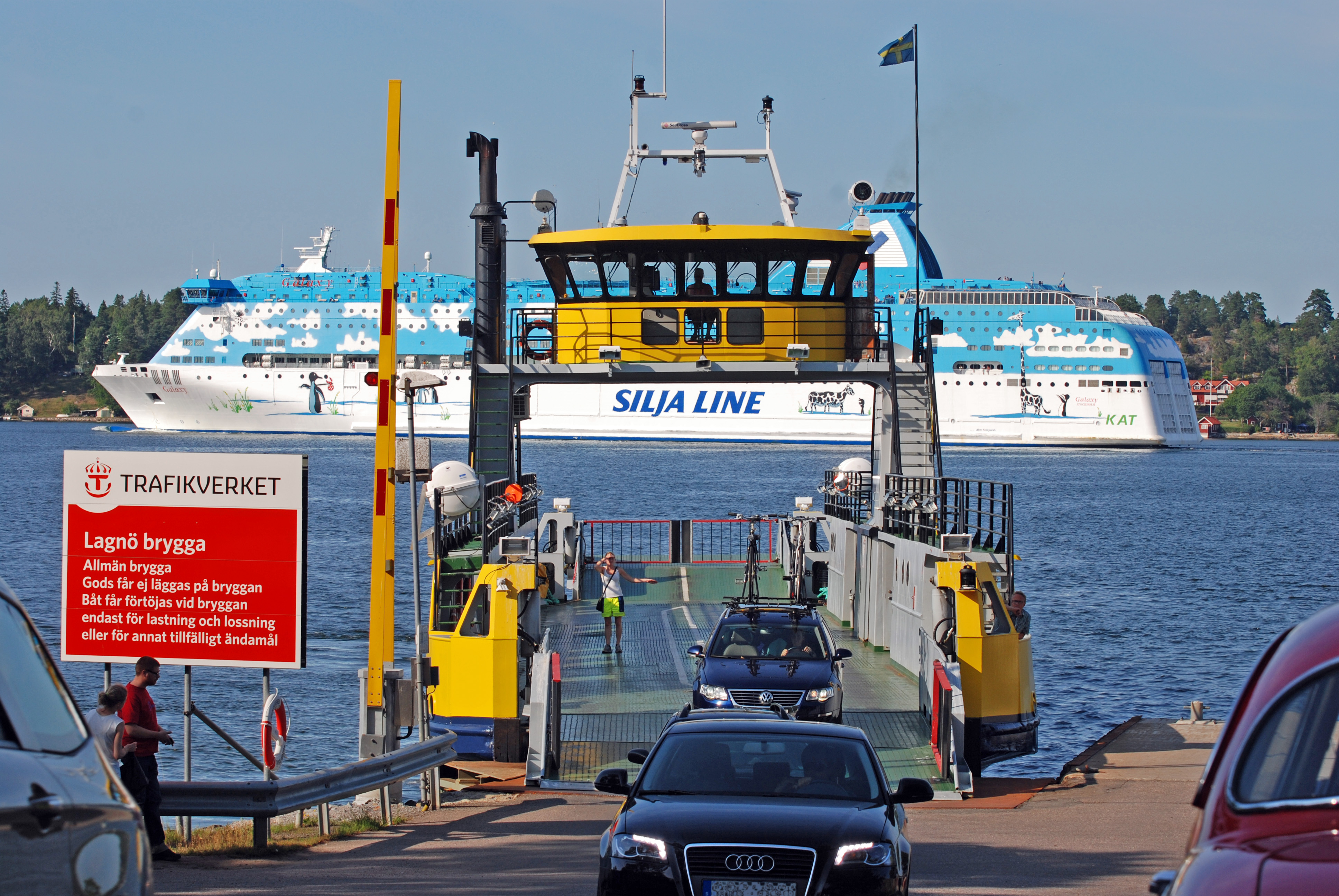 Lagnö brygga, Värmdö